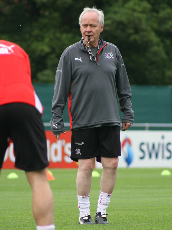 Köbi Kuhn im Trainingslager der Schweizer Fussballnationalmannschaft vor der Euro 2008